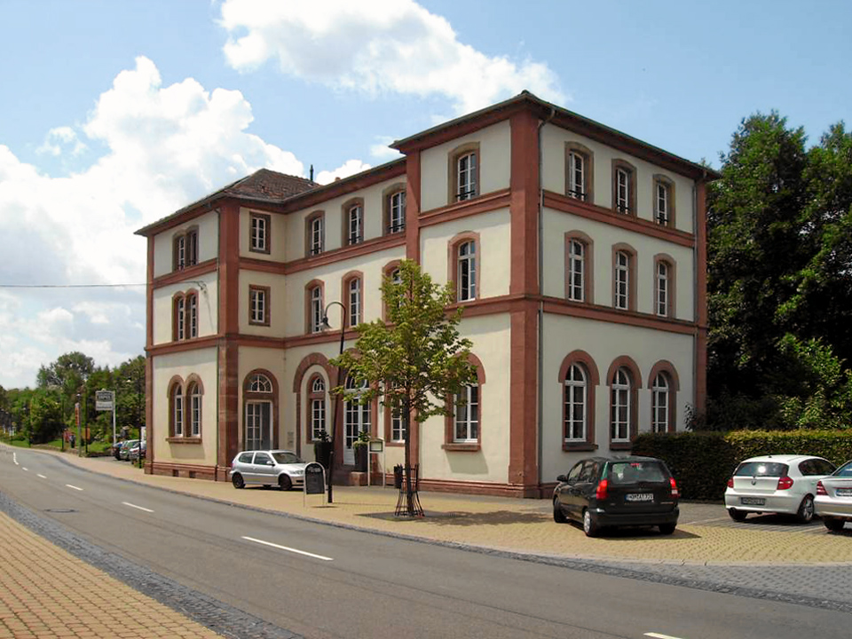 Gersheim: historischer Bahnhof